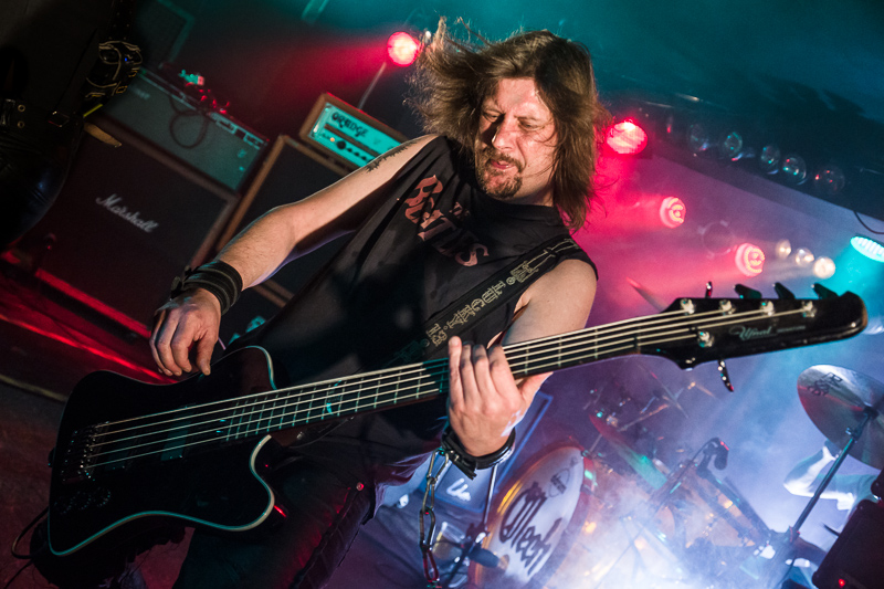 Tomasz Solnica, basista zespołu Mech podczas koncertu charytatywnego Stefan Fest w klubie Fonobar w Warszawie, 1 maja 2013.